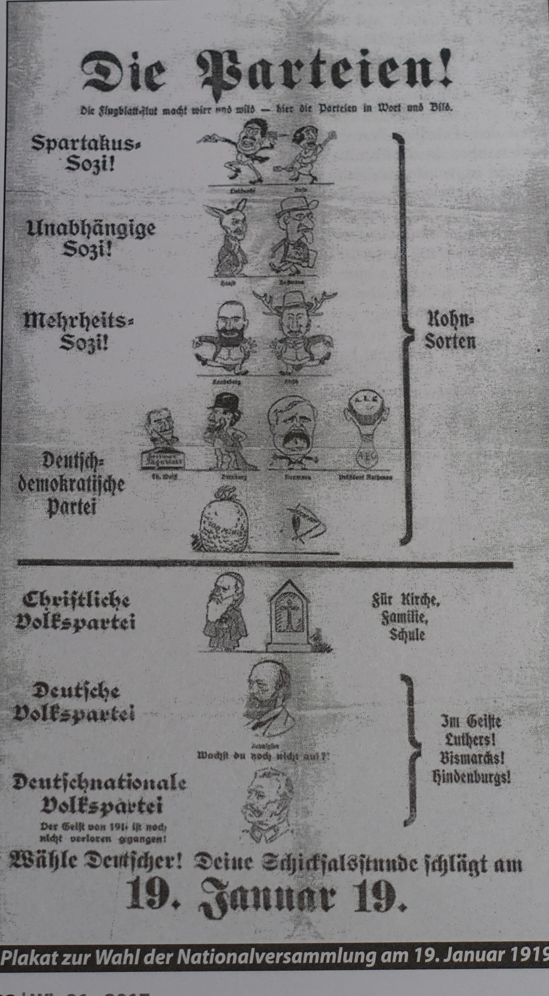 Antisemitismus 1919: Plakat zur Wahl der Nationalversammlung 19. Januar 1919